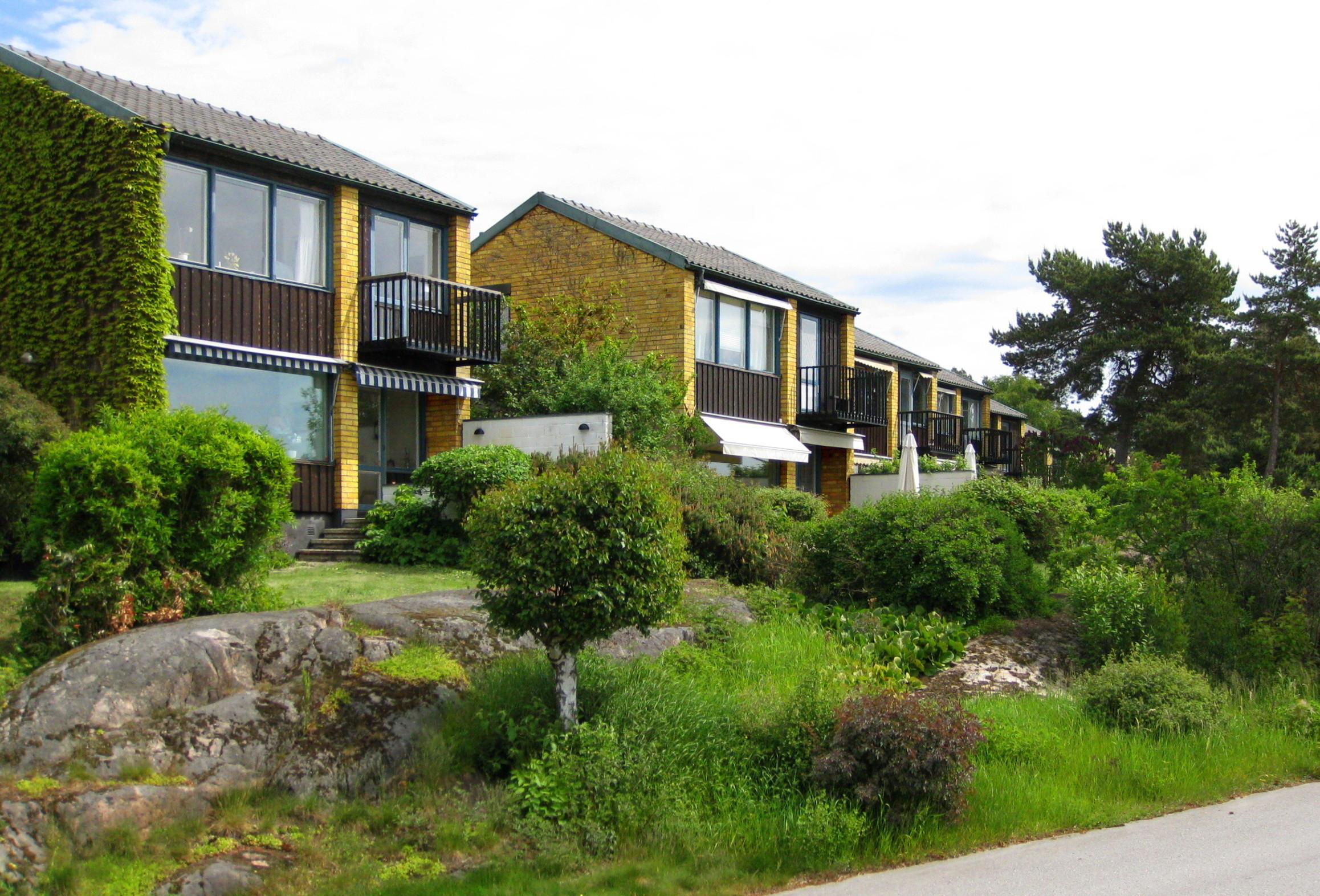 Villor vid Mälarblick, Nockebyhov, Bromma, västra Stockholm. Husen vid Mälarblick ritades av Gösta Nordin och Boel Christiansen och uppfördes under åren 1961-1966.